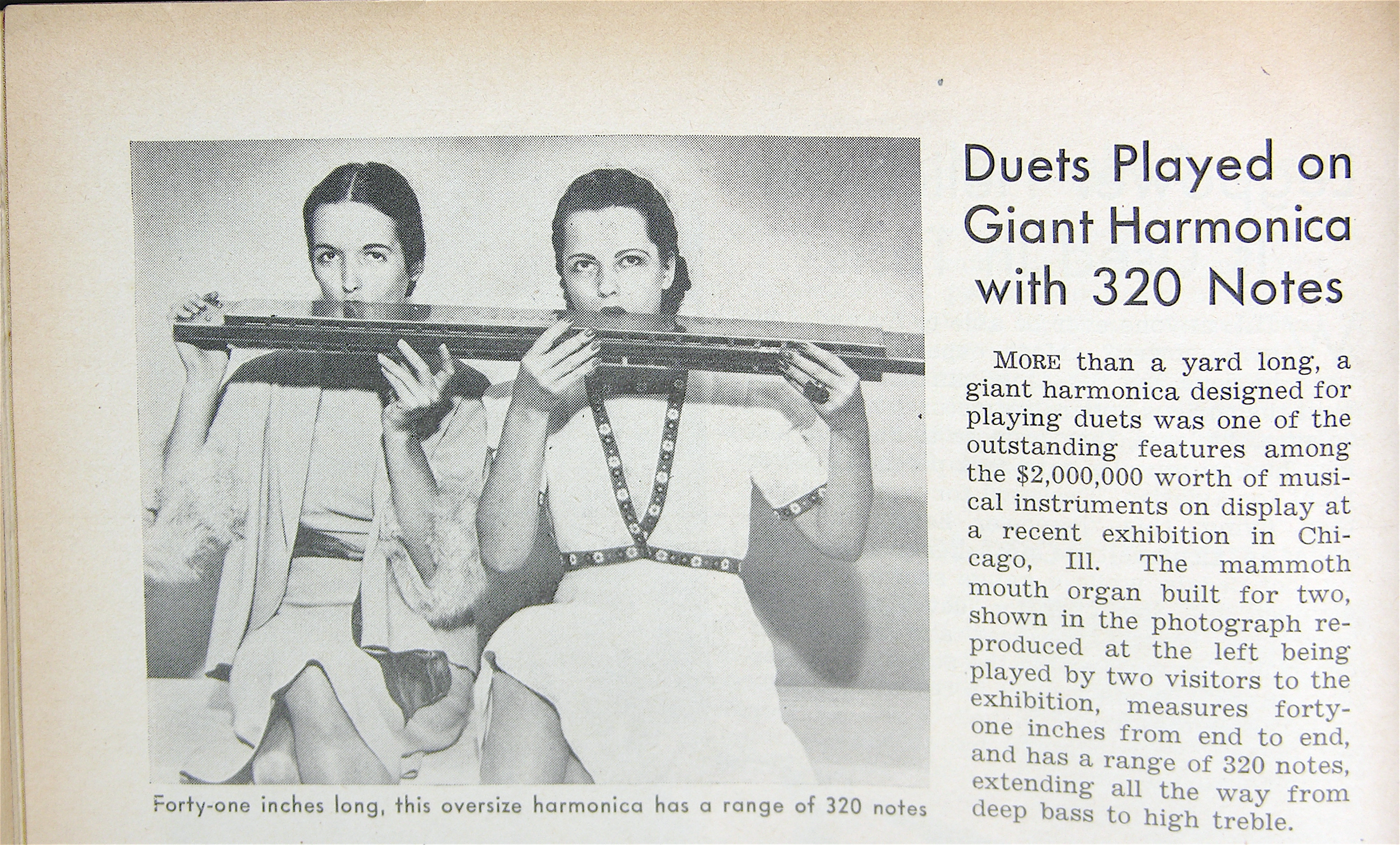 From 1938 Popular Science